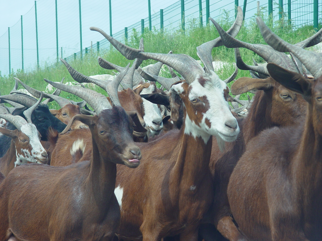 Chèvres du Rove (troupeau Gouiran) dans le village du Rove (Bouches du Rhône)